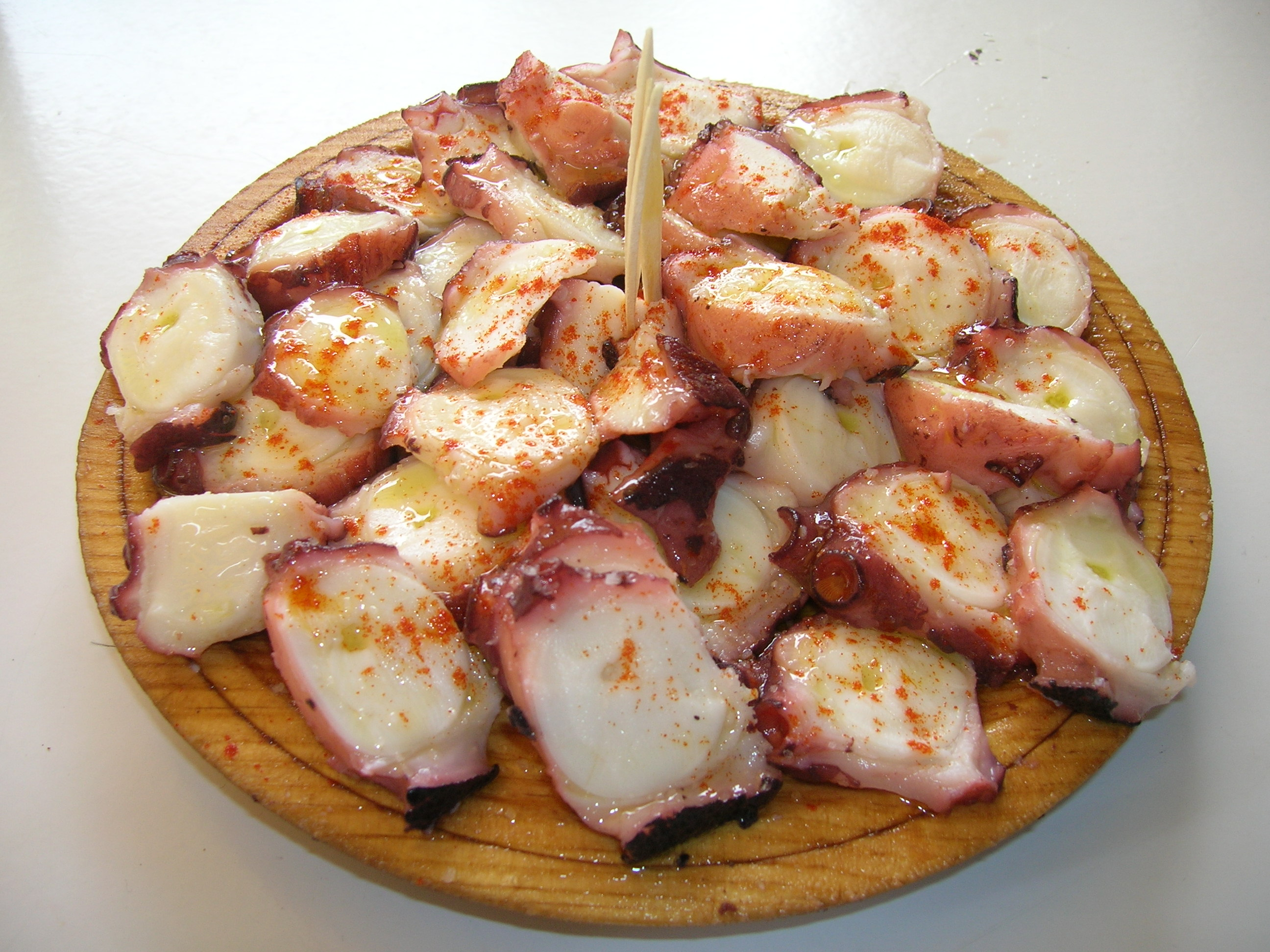 Prato preparado de polbo á feira'Polbo á feira'